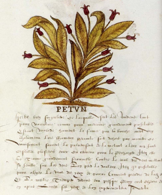 Drake manuscript f. 4v: Petun (Nicotiana sp.)